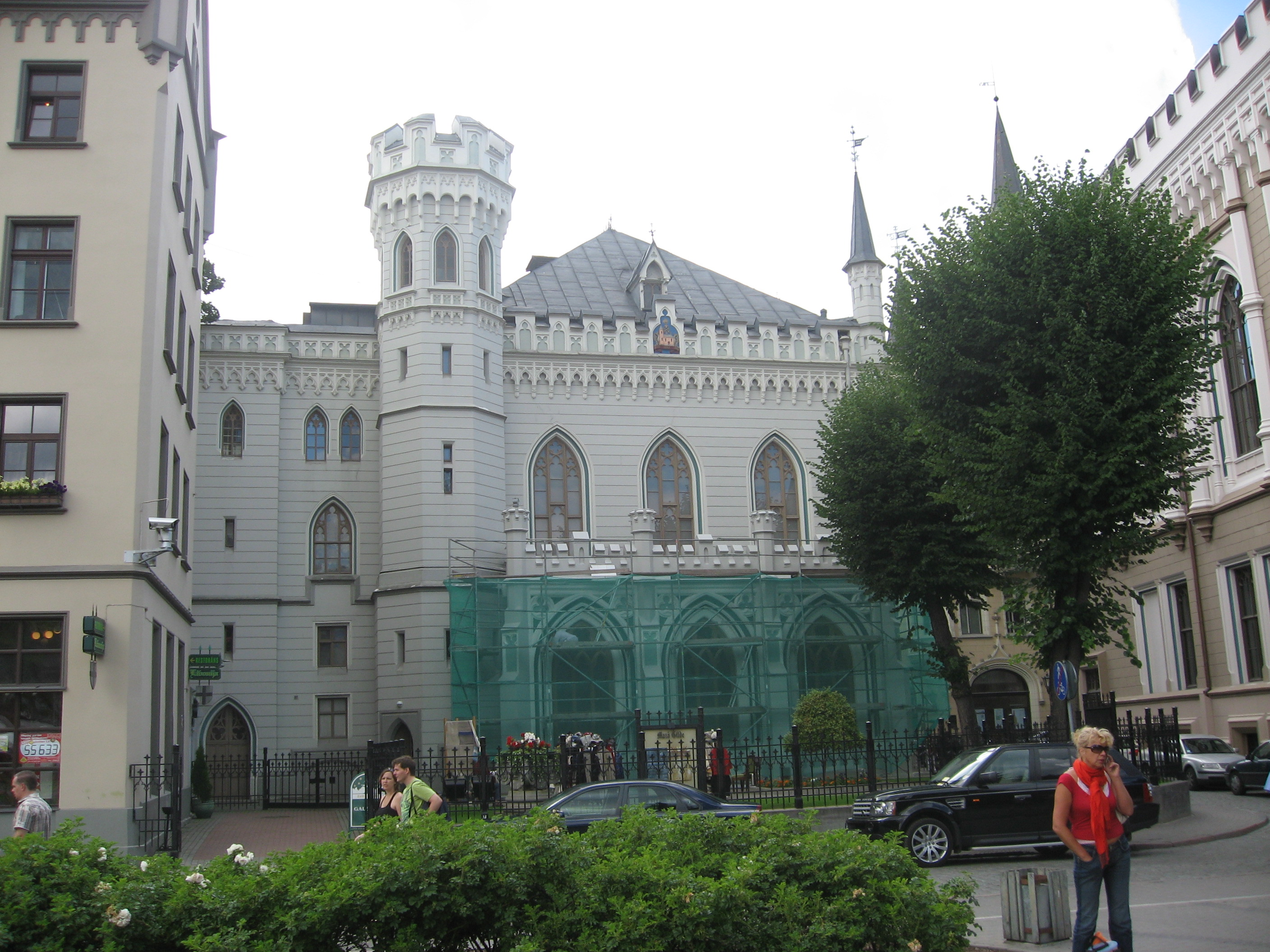 Mazā Ģilde